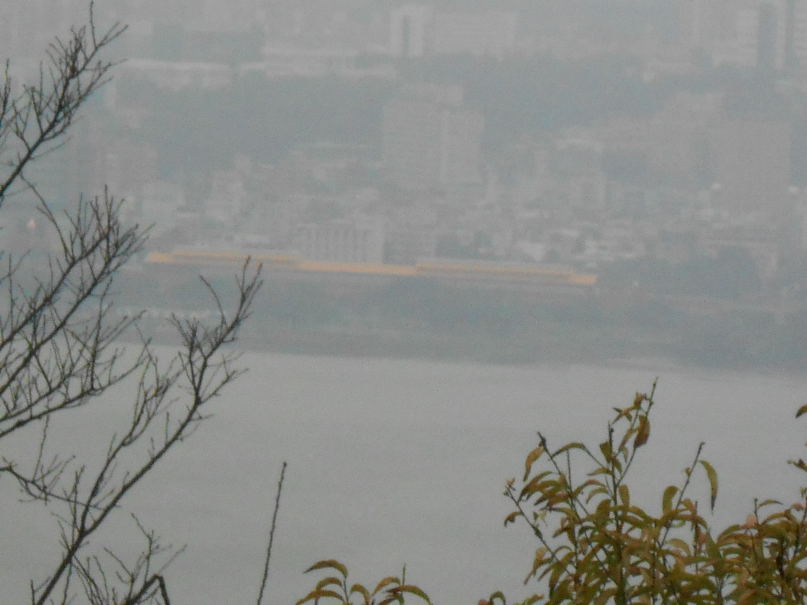 從觀音山中埔寮步道俯瞰淡水捷運站